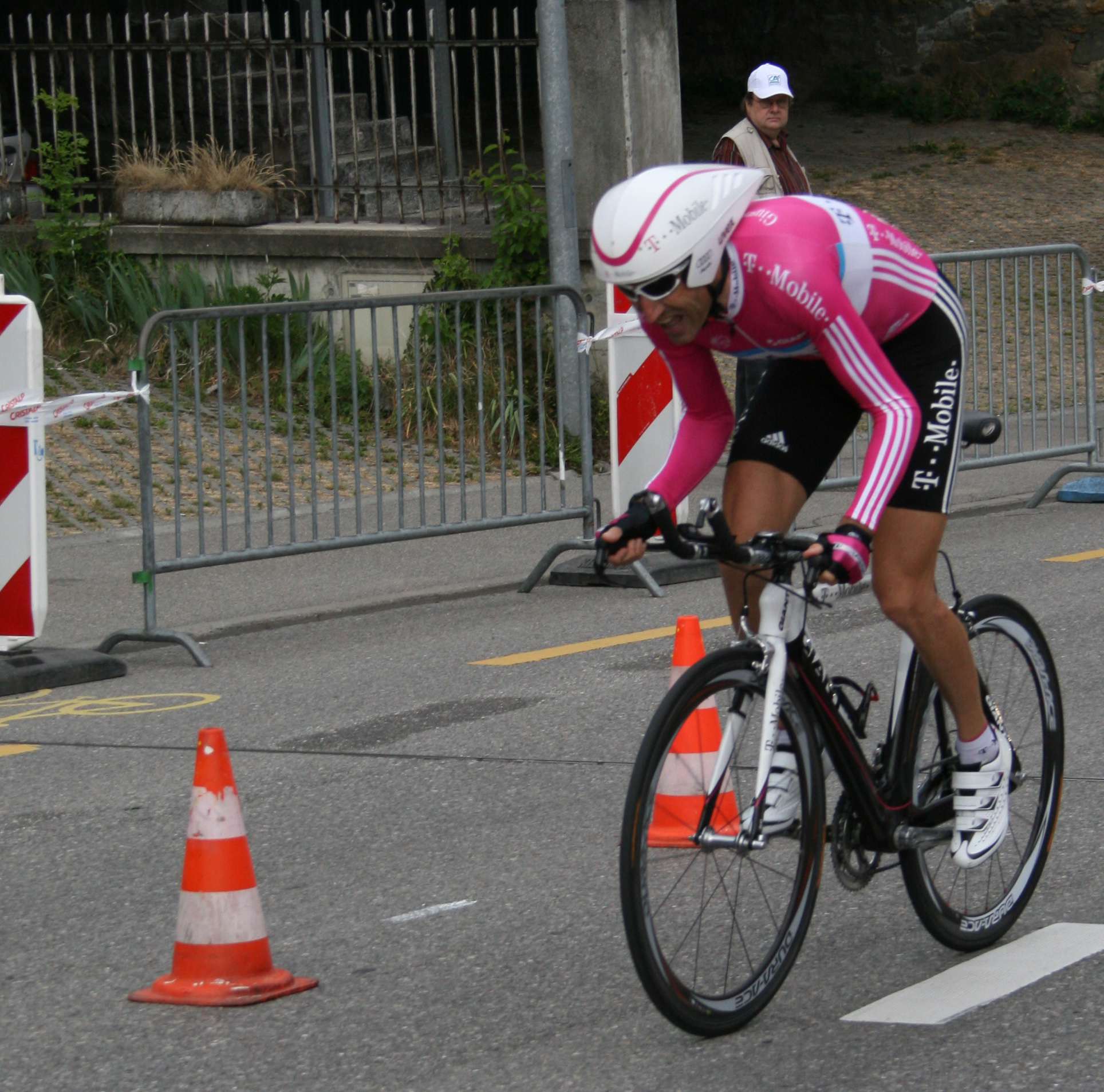 Guiseppe_Guerini prologue du Tour de Romandie 2007